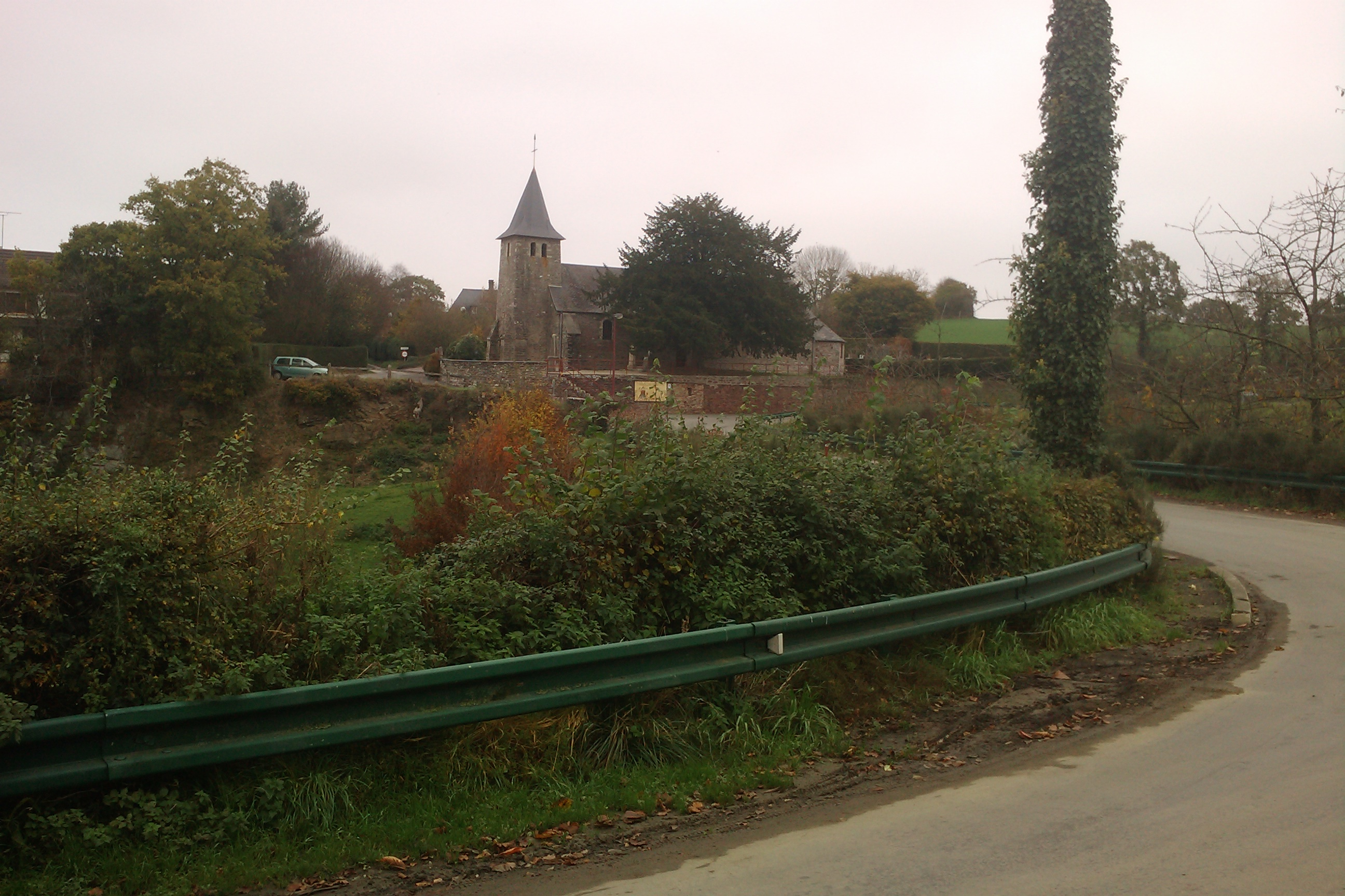 Vue sur Église Saint-Pierre (XVIIIe) de Brectouville